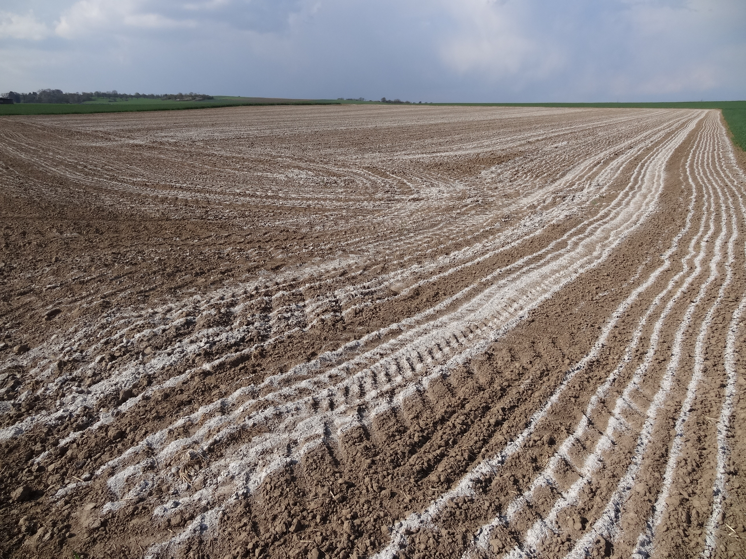 fertiliser field